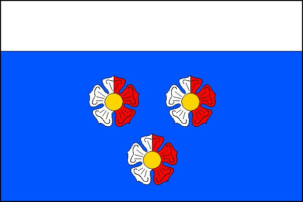 Vlajka obce Chrastavice